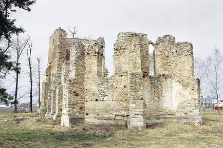 Ruinele catedralei catolice din Baia, jud. Suceava (încep. sec. XV)